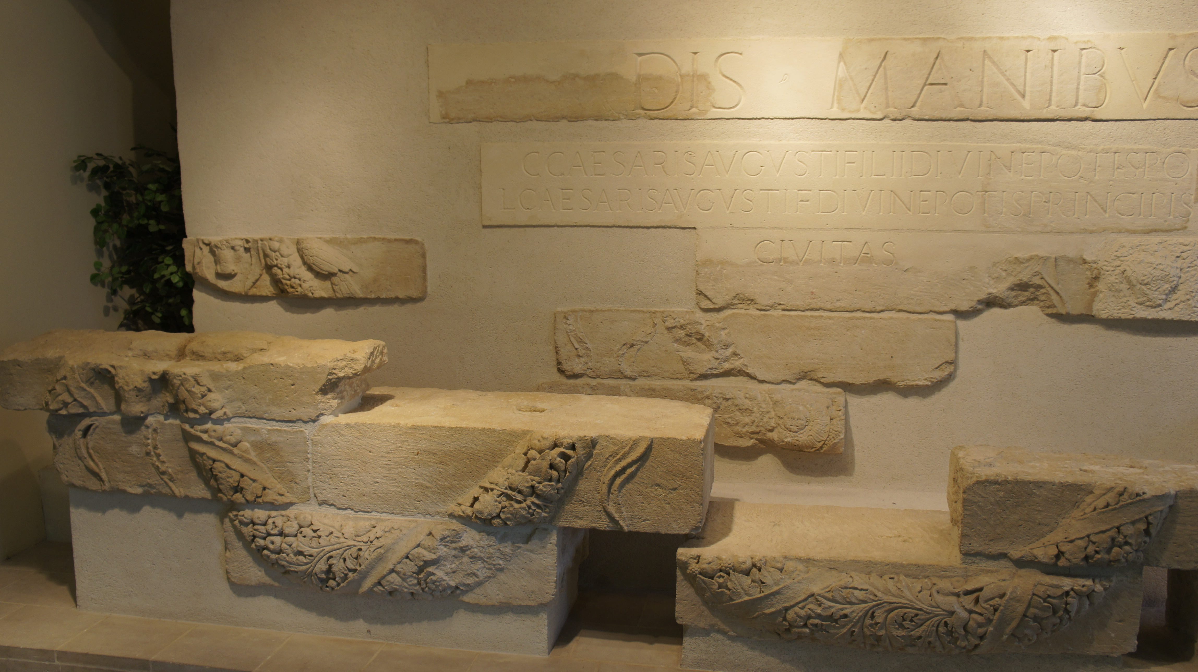 Monument ayant servi en tant que pierres de ré-emploi lors de la construction du mur sous ardien, présenté au Musée st-Remi.